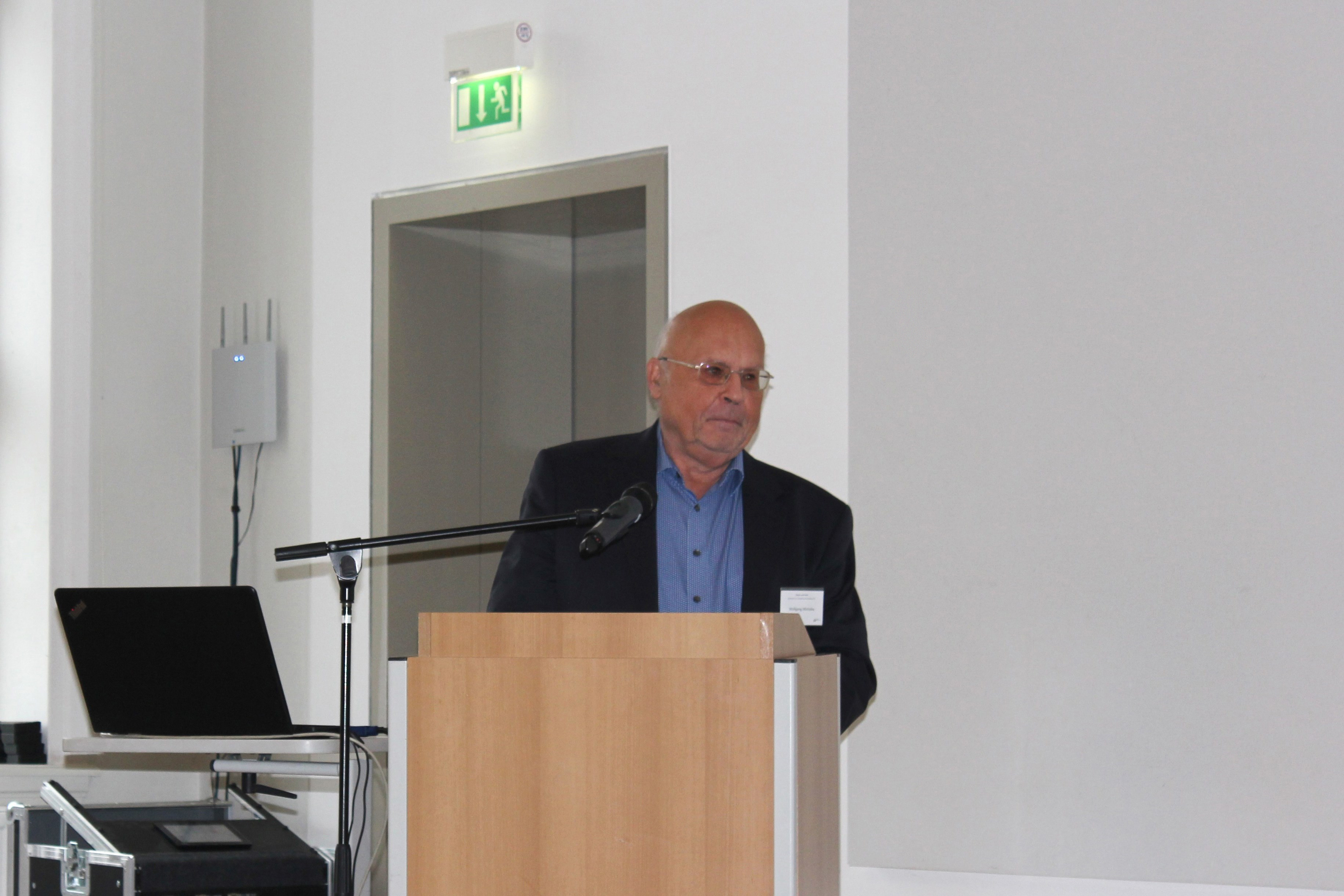 Wolfgang Michalka auf dem Kolloquium zur Liberalismus-Forschung 2018 in Jena